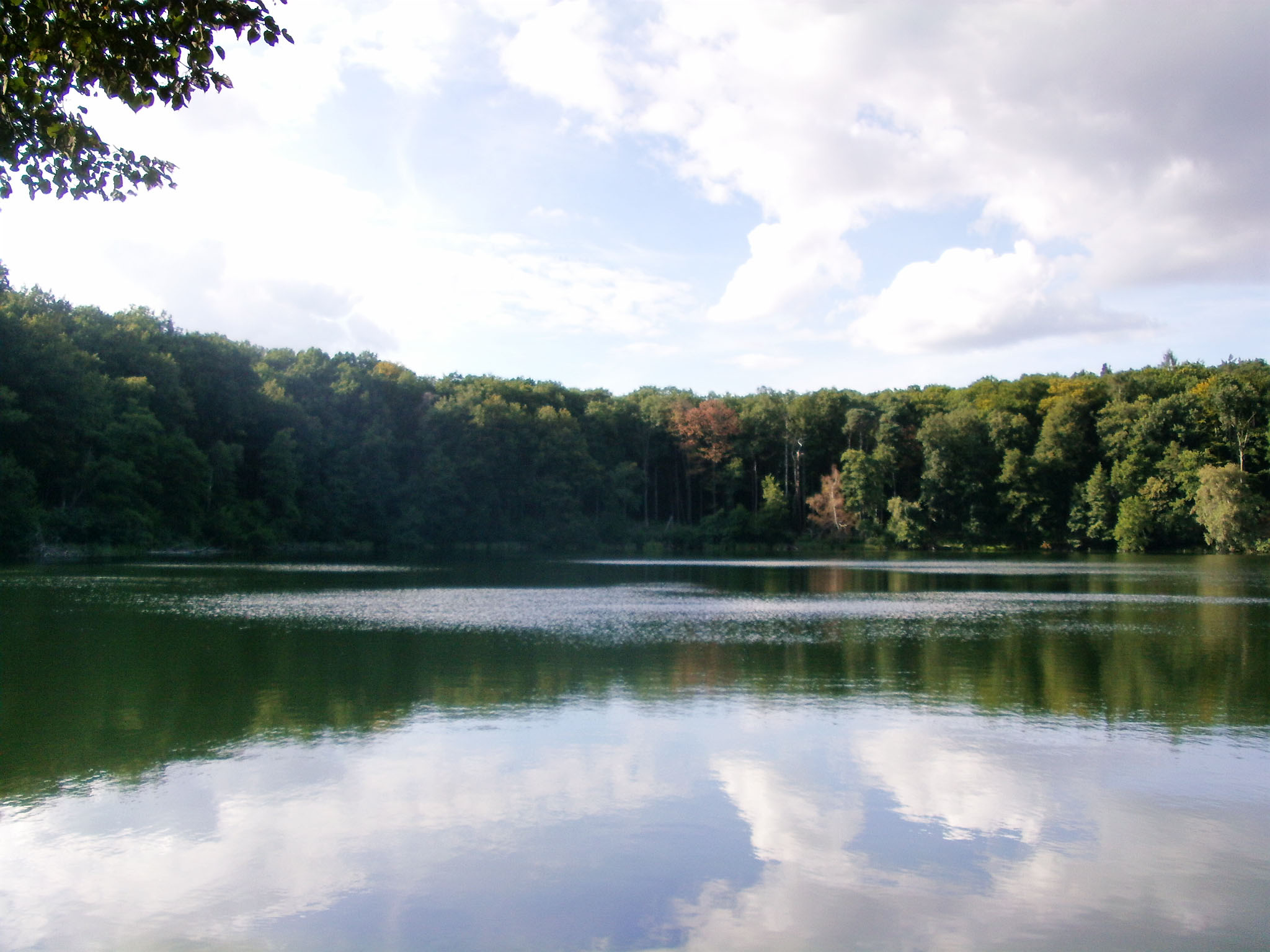 jezioro Kociołek